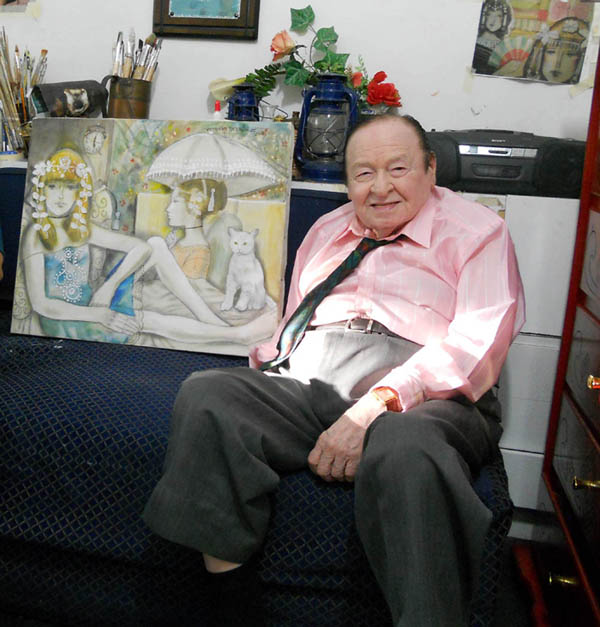 Maestro Virgilio Trompiz